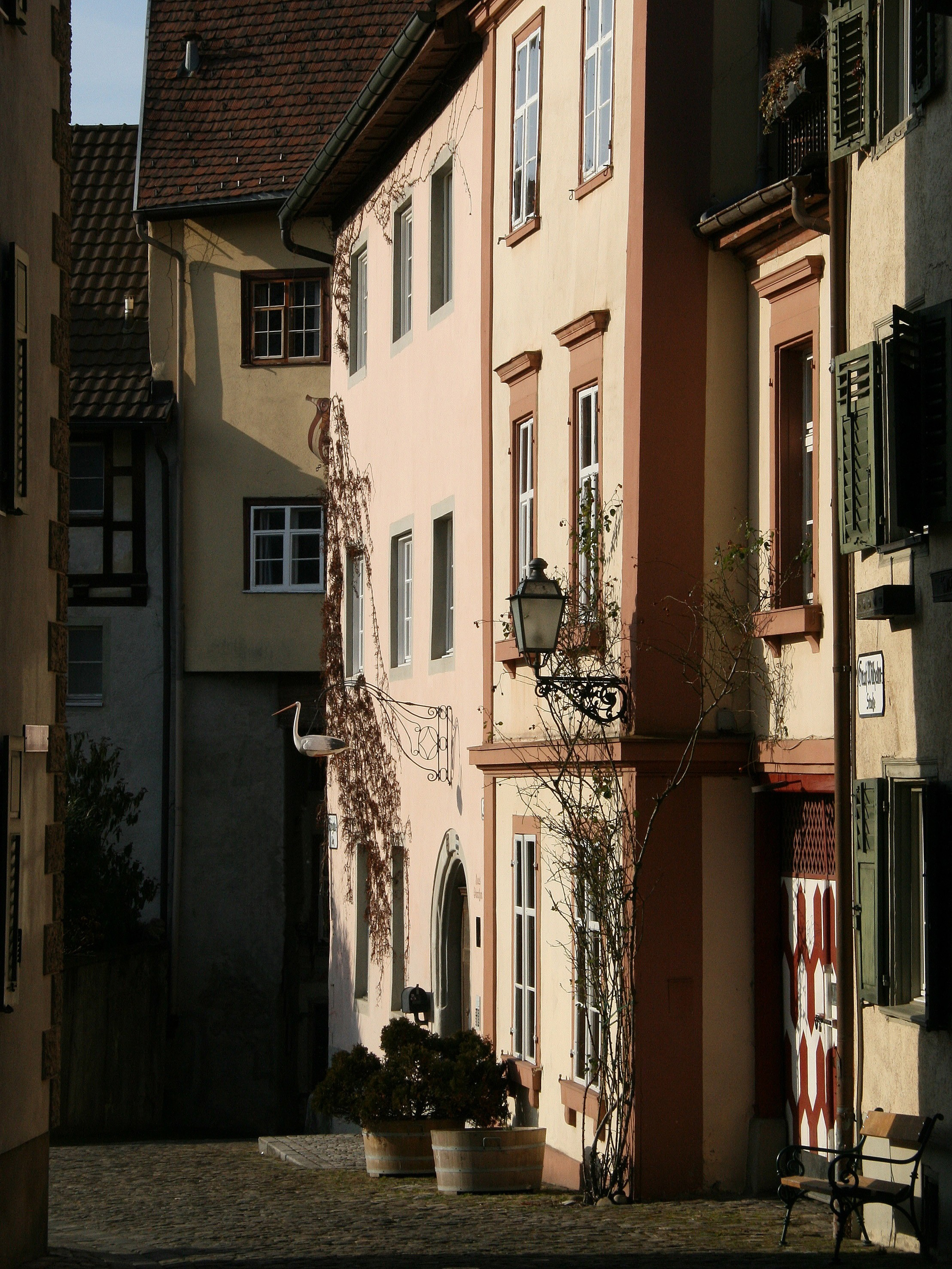 Häuser der Graf-Wilhelm-Strasse in der Oberstadt von Bregenz, Vorarlberg